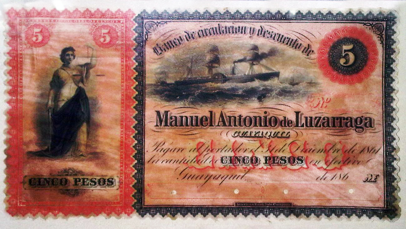 Uno de los billetes impresos en Londres 1860 para la Casa de Luzárraga, actualmente exhibidos en el Museo de la Moneda del Banco de Guayaquil.